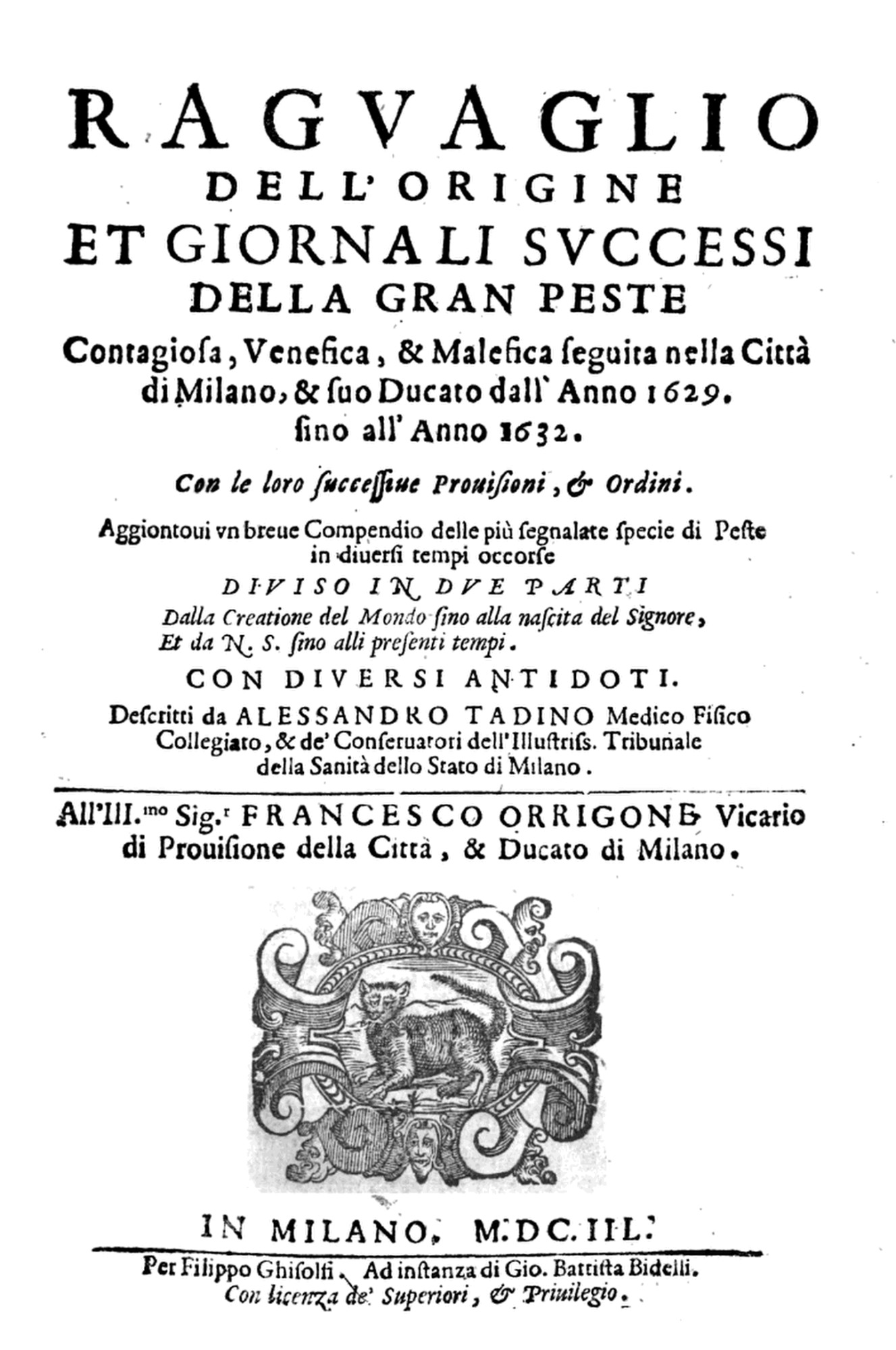 Alessandro Tadino, Raguaglio dell'origine et giornali successi della gran peste contagiosa venefica et malefica seguita nella città di Milano et suo Ducato dall'anno 1629 fino all'anno 1632